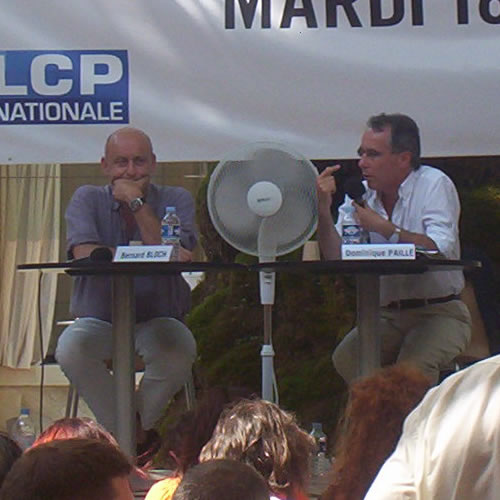 Bernard Bloch (à gauche) et Dominique Paillé (à droite), aux journées du Syndéac 2006, à Avignon